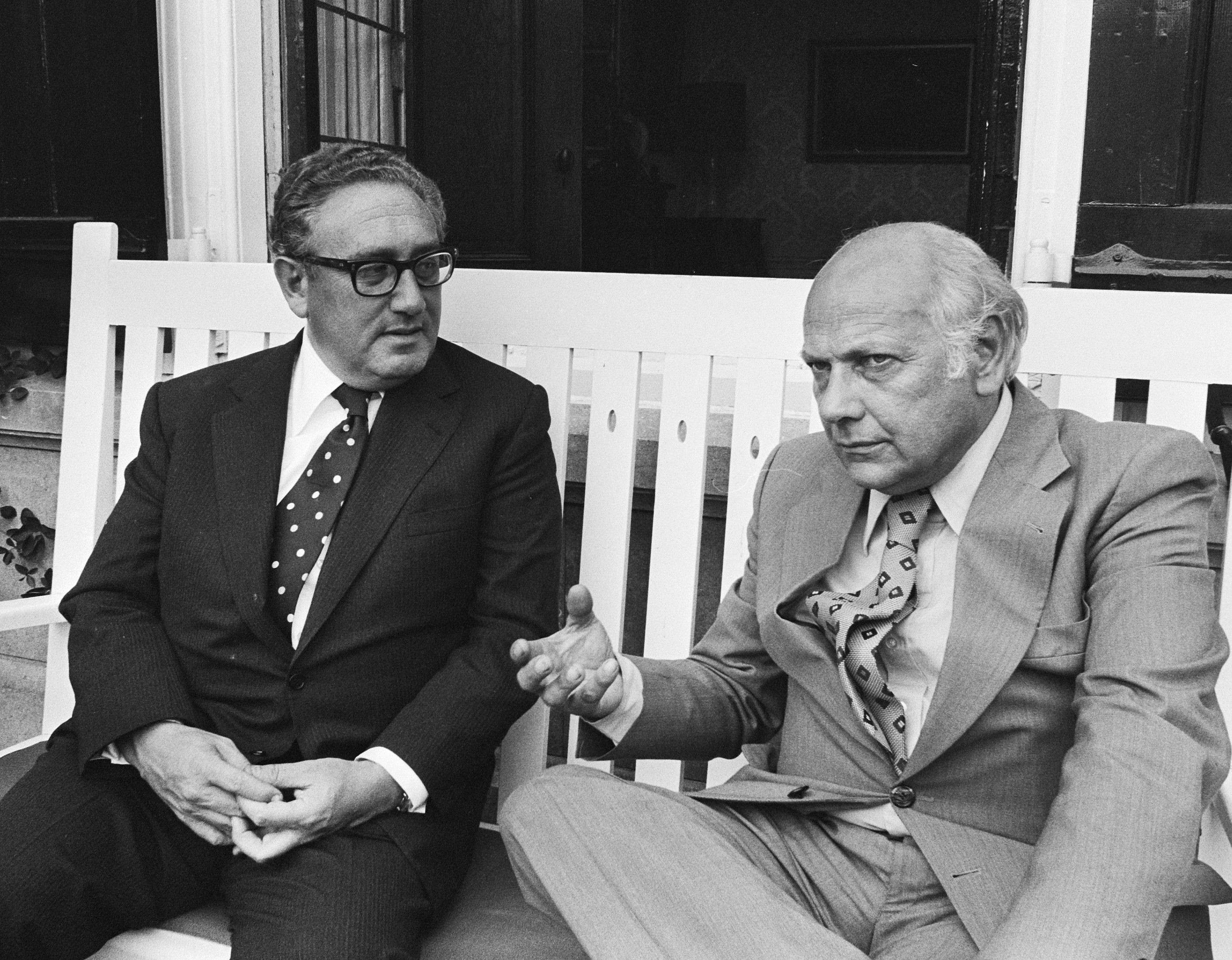 Amerikaanse Minister van Buitenlandse Zaken, dr. Henry Kissinger brengt bezoek aan Den Uyl op Catshuis, Kissinger, kop